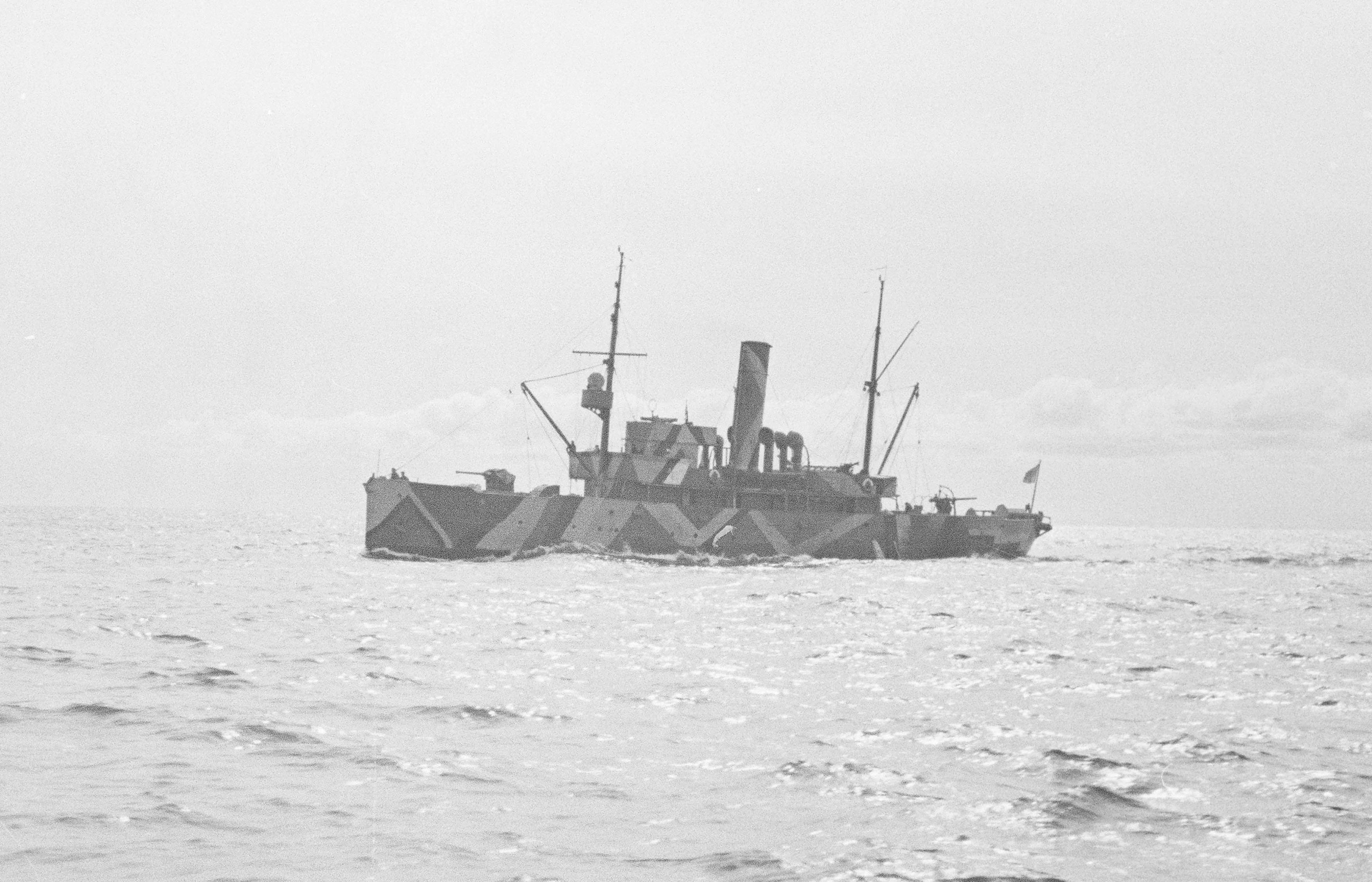 Miinalaiva Louhi saattaa aluksia Ahvenanmerellä elokuussa 1942. (SA-kuva 106787)